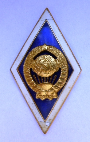 Нагрудный Знак Выпускника Университета СССР. 1956 г. Многие сотрудники органов внутренних дел были выпускниками юридических факультетов Университетов и имели право на ношение данного знака на униформе.